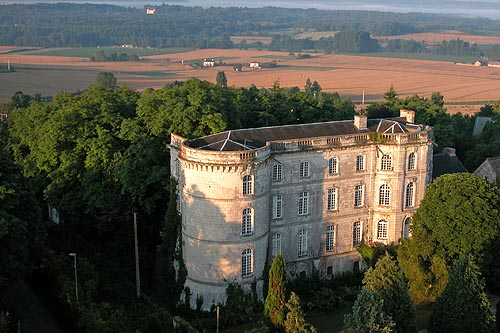 Vue aérienne oblique nord-est du Château de Targé (juillet 2002).